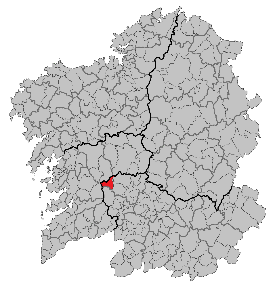 Mapa coa localización do concello de Beariz.